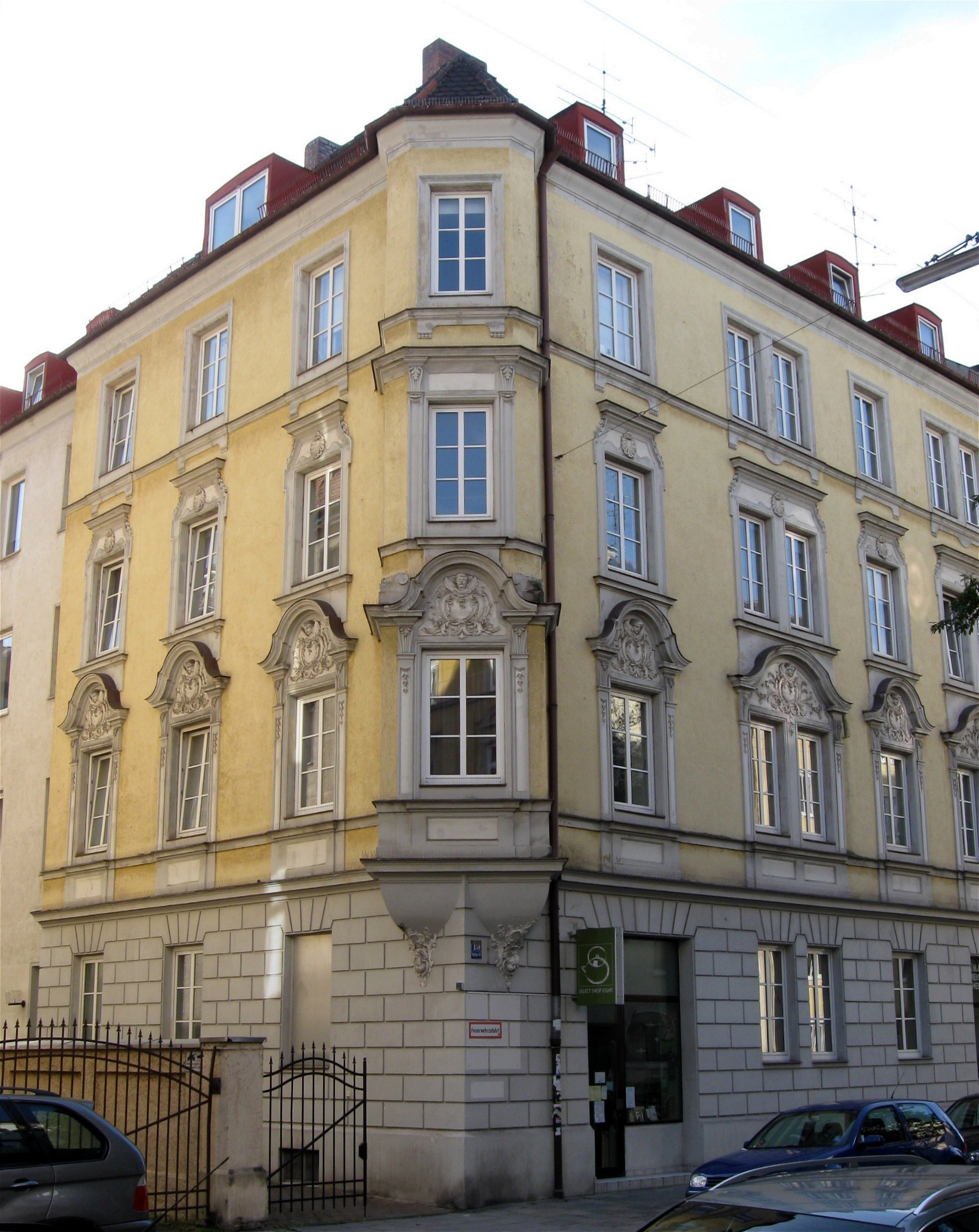 Waltherstraße 19; Mietshaus, neubarock, mit Eckerker, reich gegliedert und stuckiert, 1895 von Alois Barbist.